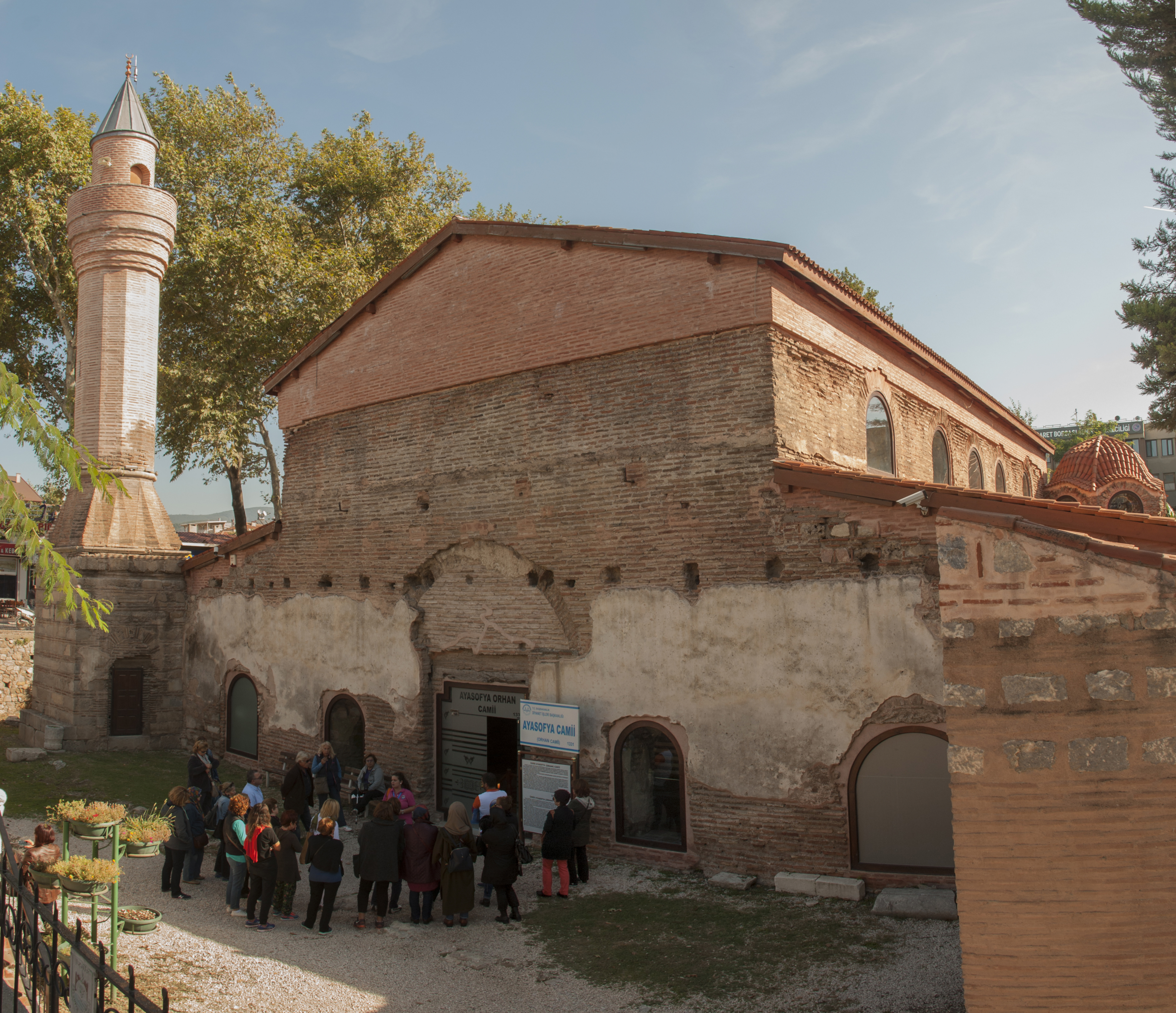 Ayasofya Camii, İznik